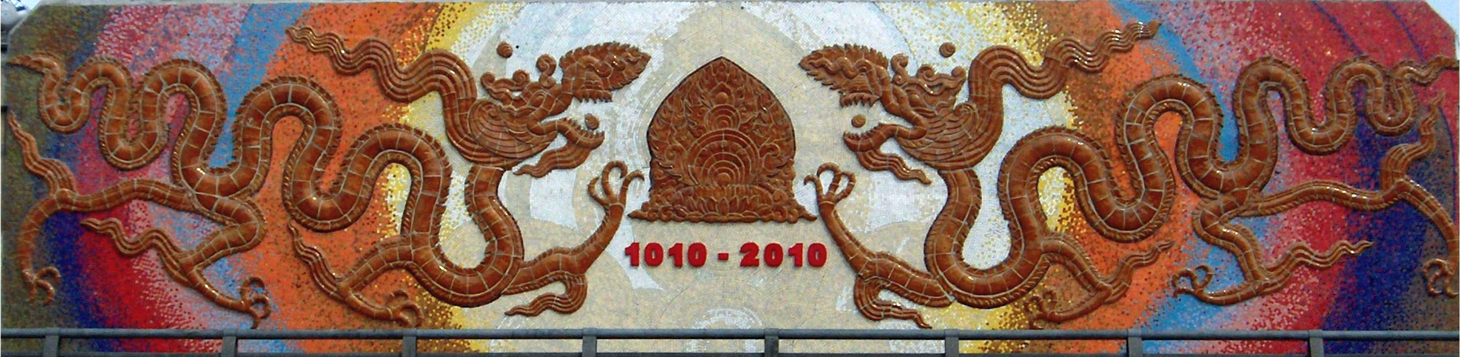 Thăng Long-con đường gốm sứ ven sông Hồng, hình đắp bên thành cầu Chương Dương.Thang Long, the porcelain way along the Red River, Vietnam